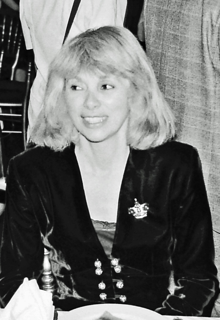 Mireille Darc, actrice française.